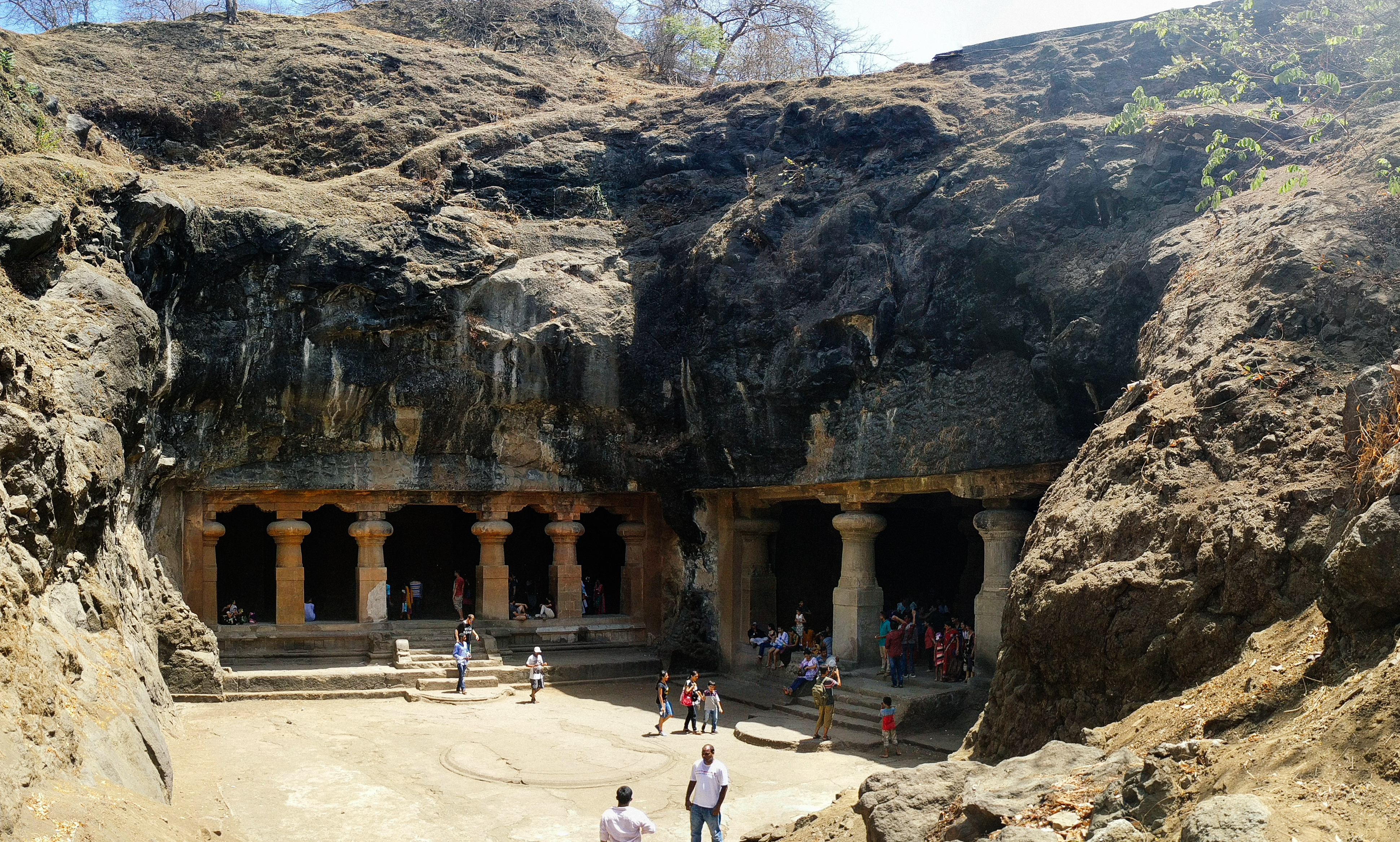 Elephanta Caves